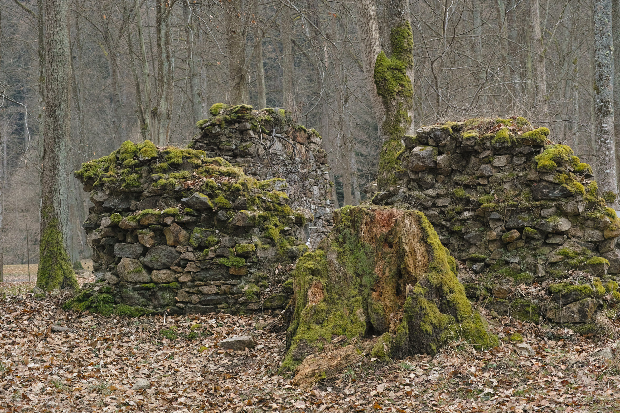 Korandův smrk pod hradem Příběnice, torzo v roce 2014